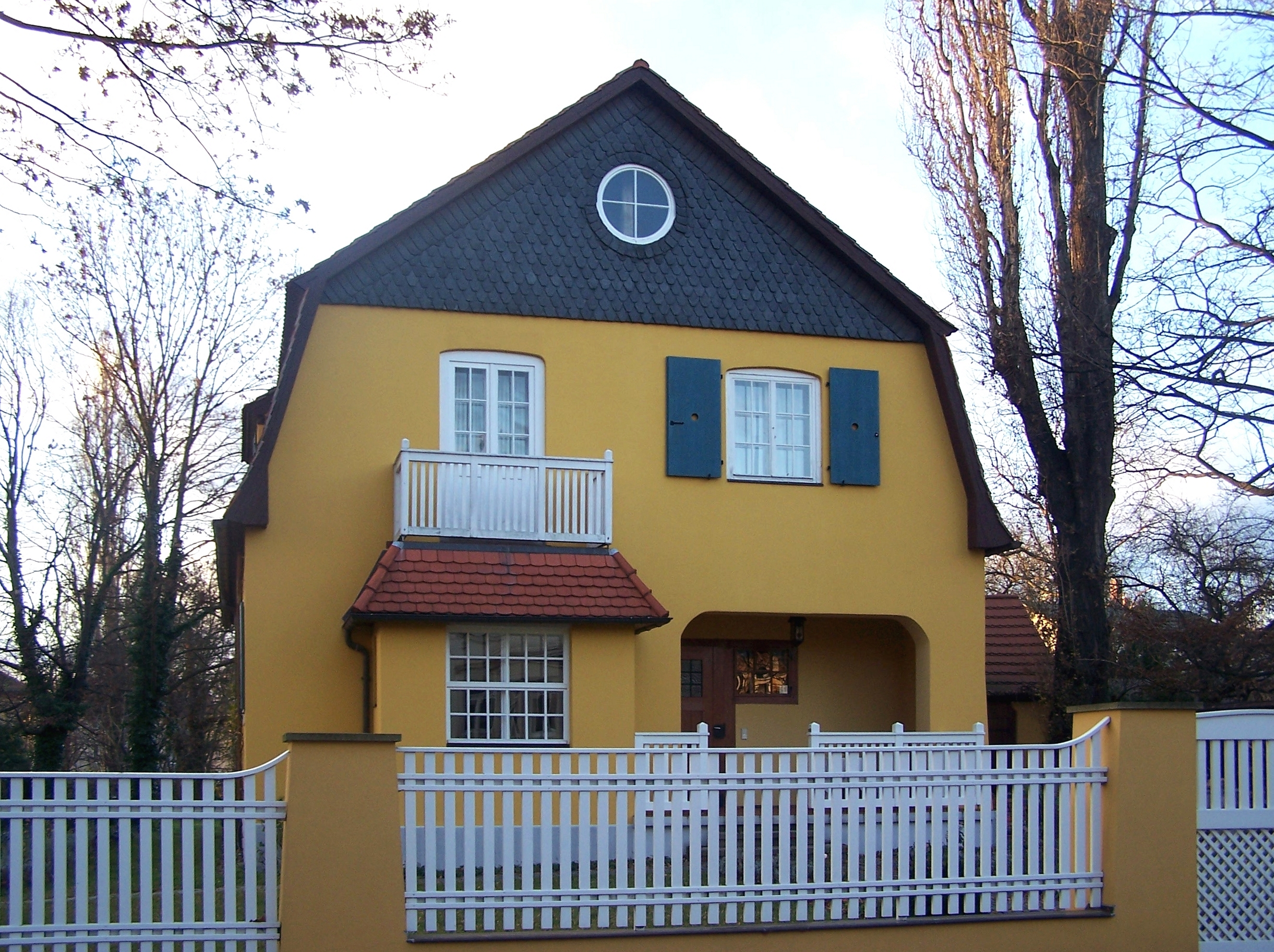 Rosenstr. 11 in Radebeul